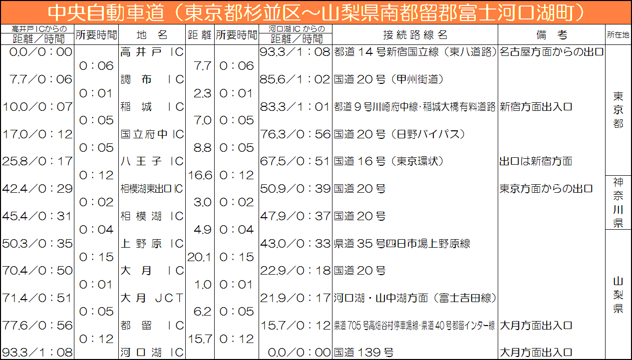 中央自動車道 高井戸インターチェンジ - 河口湖インターチェンジ 間の道路時刻表